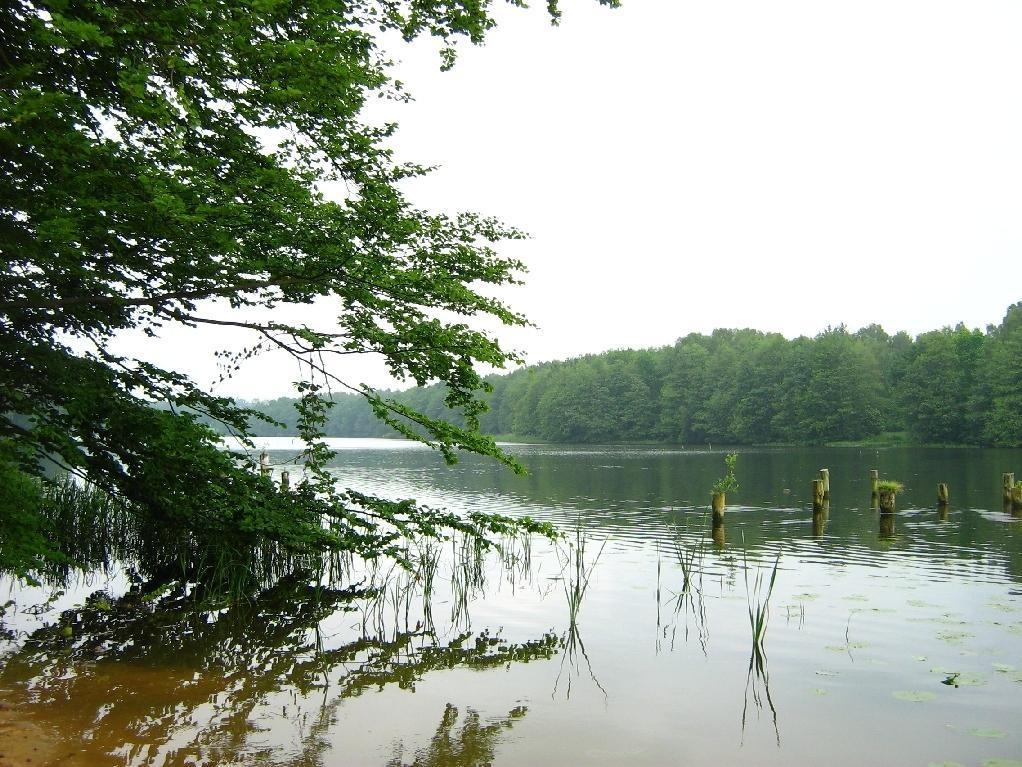 Die Rega, ein Fluss in Hinterpommern, Woiwodschaft Westpommern (Nordwestpolen). Im Bild die Erweiterung der Rega zum Rejowickie-Stausee (Talsperre Lebbin).